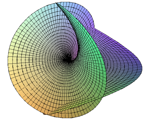 Die Enneper-Fläche